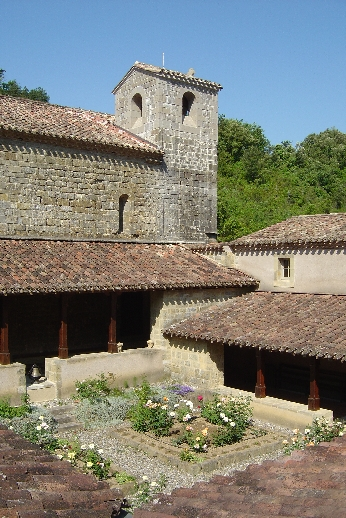 Le clochet du prieuré de Rieunette